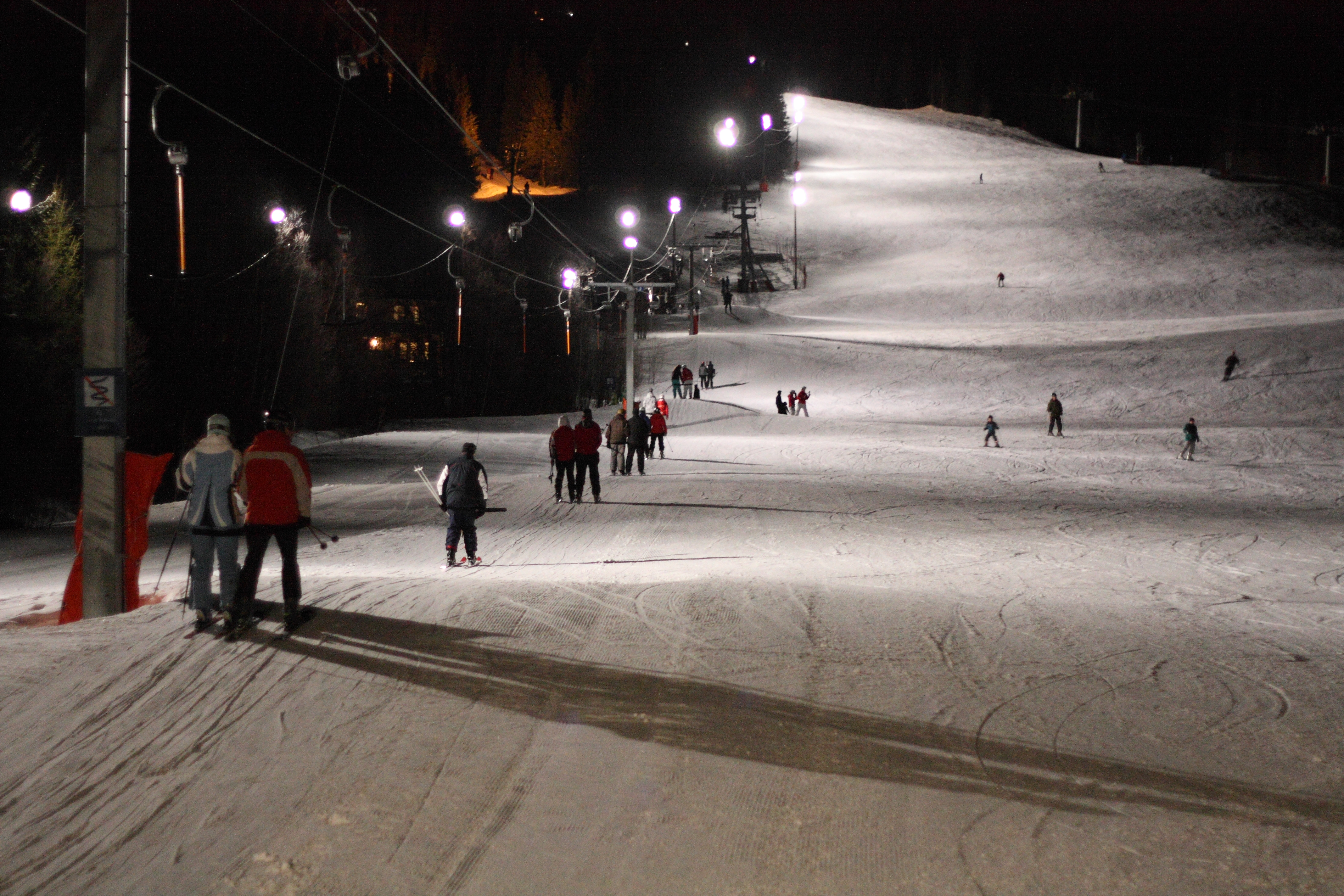 Nightskiing in Duved, Åre, Sweden. Hamreliften lift and Harmebacken pista.